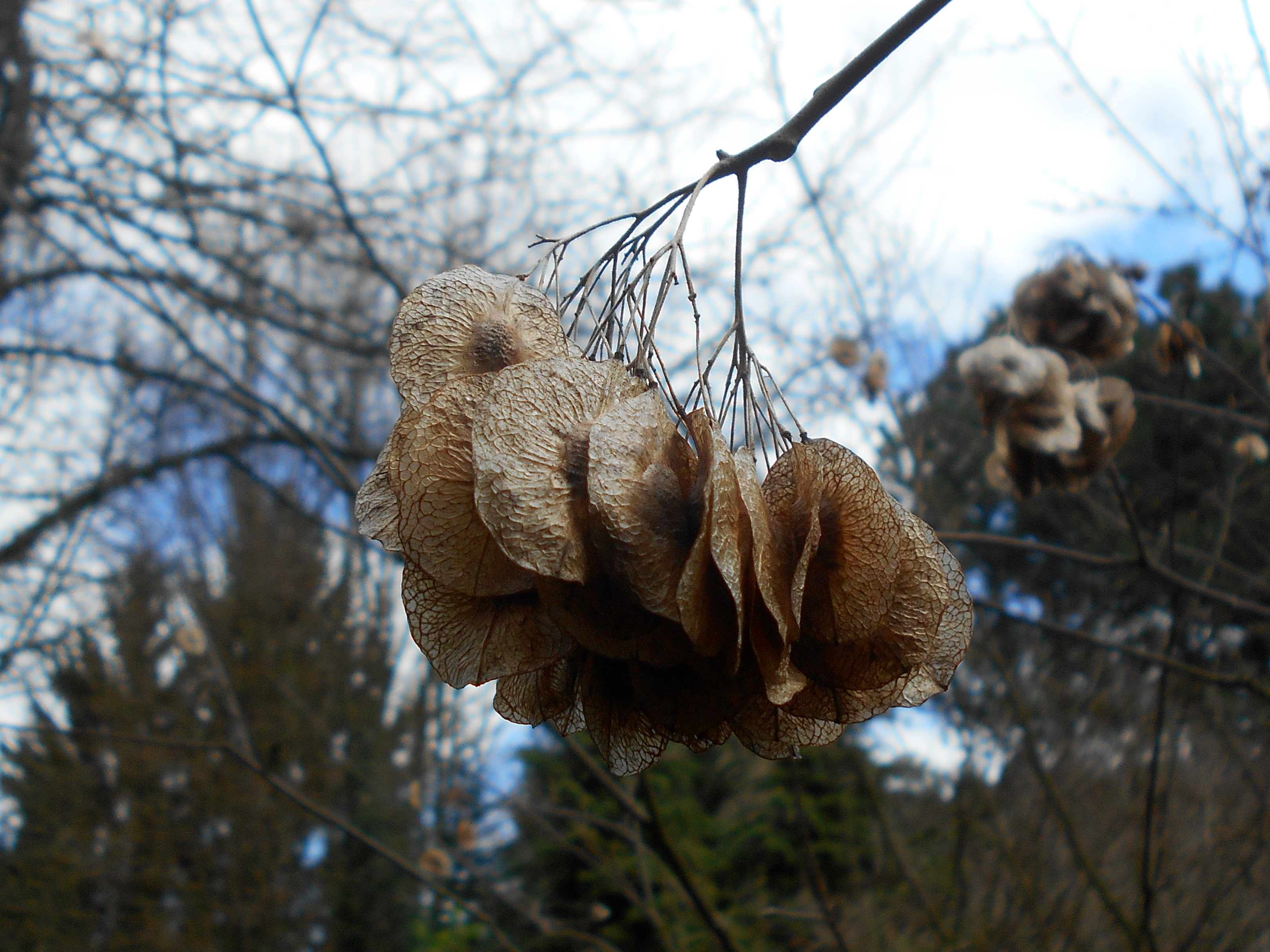 Parczelina trójlistkowa (Ptelea trifoliata), Ogród Botaniczny UMCS w Lublinie.